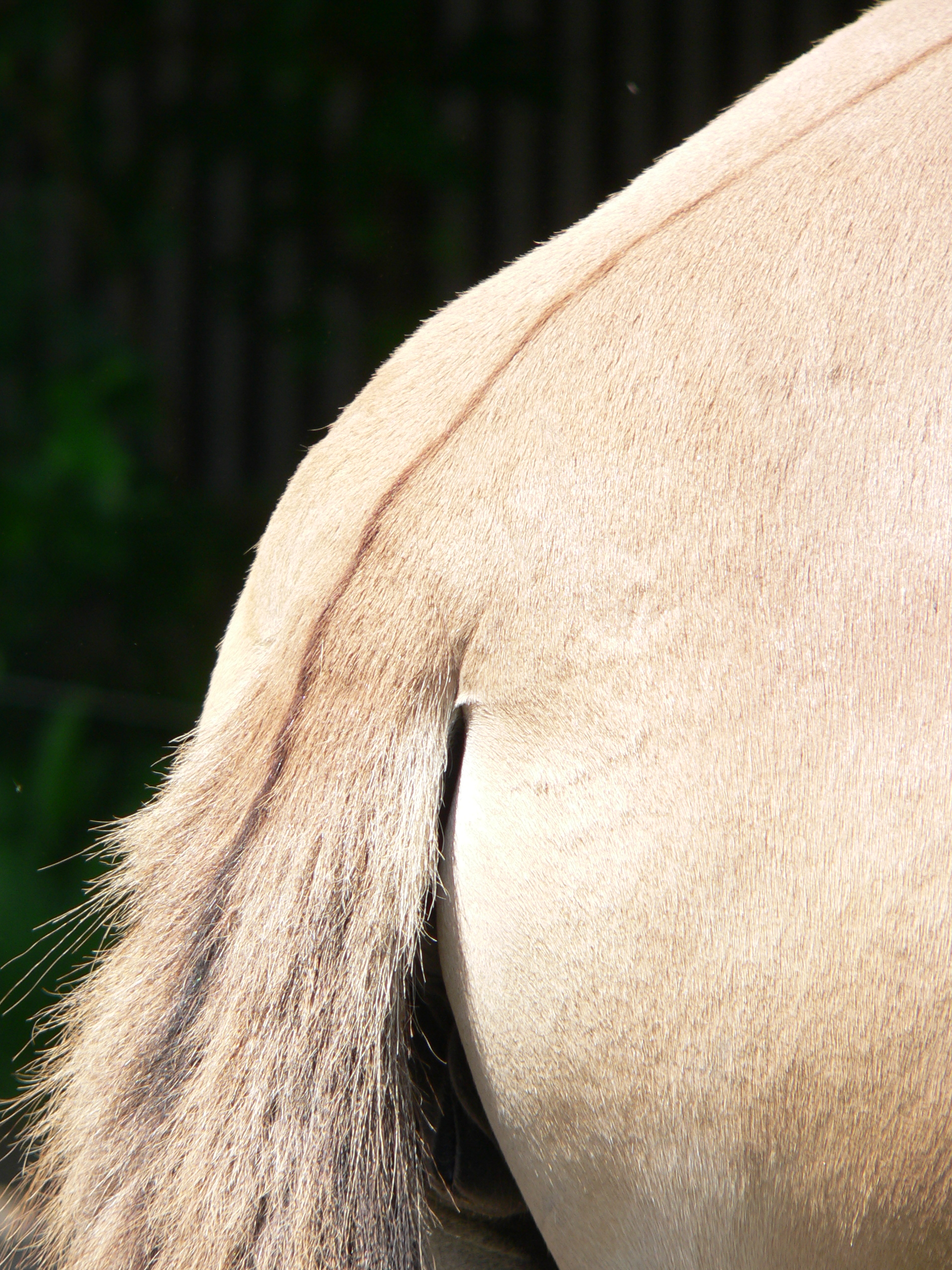 Przewalski Horse